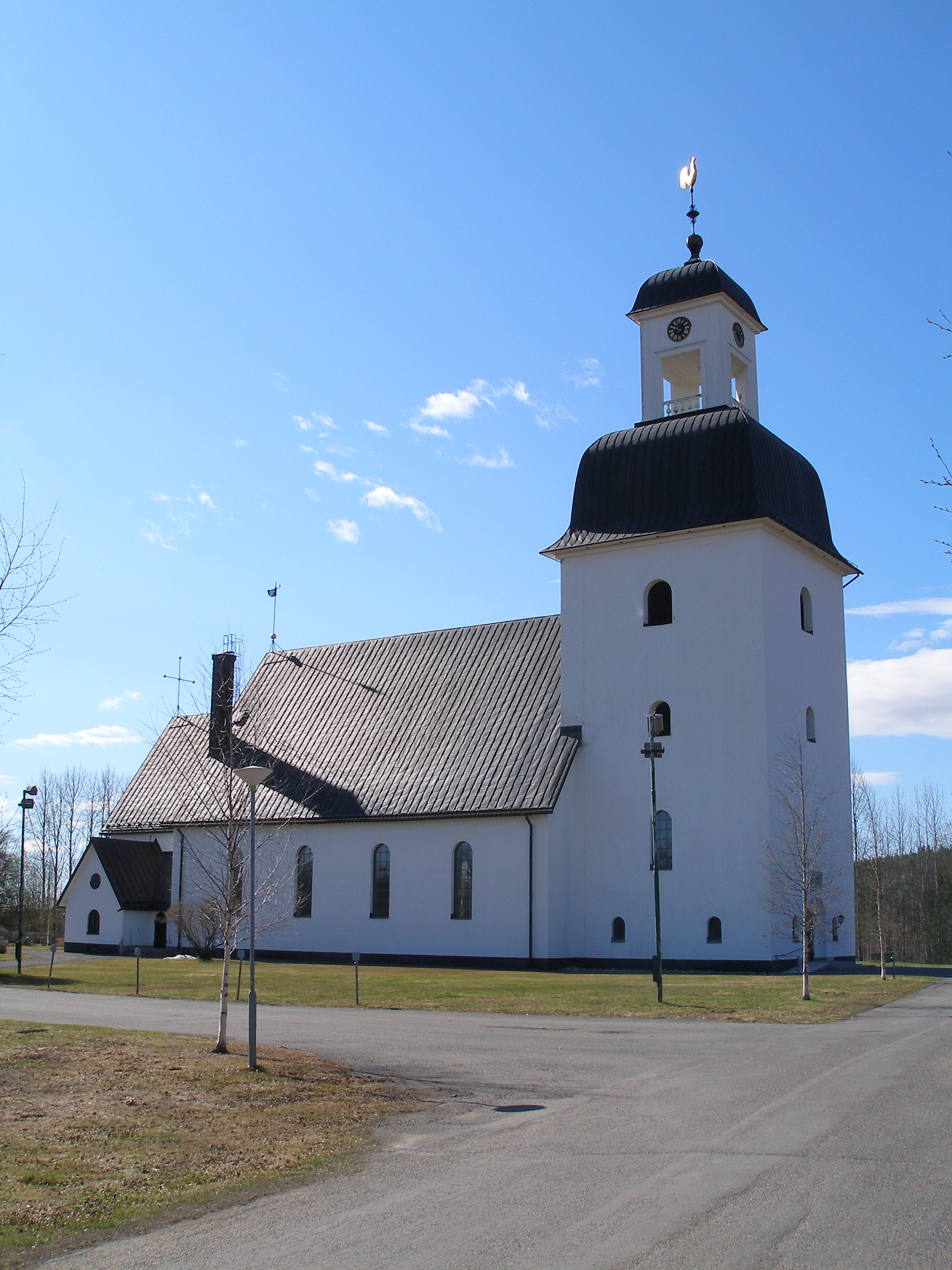 Kågedalens kyrka i Kusmark, Skellefteå kommun.